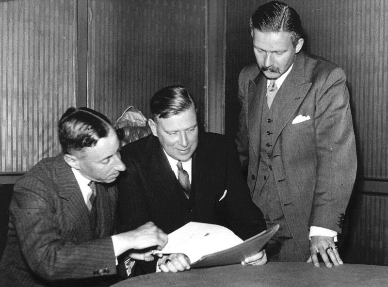 Het leidinggevende driemanschap van de Nederlandse Unie. V.l.n.r. dr. J.E. de Quay, mr. L. Einthoven en dr. J. Linthorst Homan. 01-07-1940